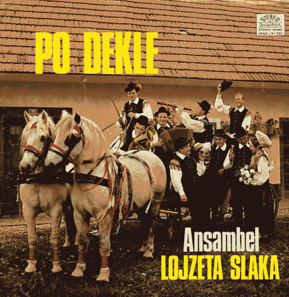 Ansambel Lojzeta Slaka - Po dekle.